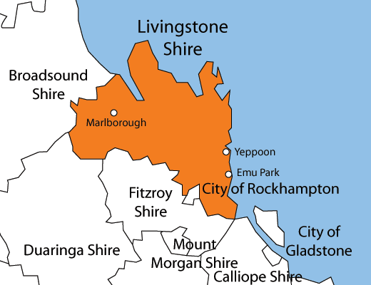 Australia Map Queensland, Local Government Area, Livingstone Shire